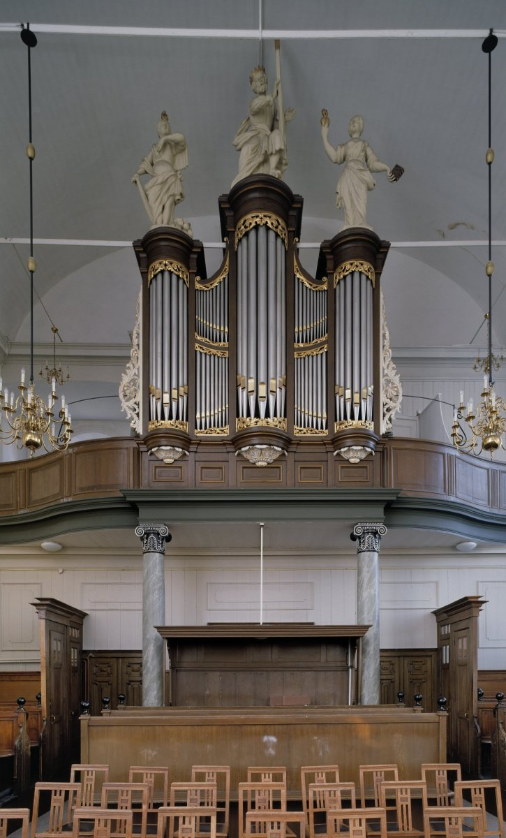 Nederlands Hervormde Kerk: Interieur, aanzicht orgel, orgelnummer 807 (opmerking: Gefotografeerd voor Het Historische Orgel in Nederland 1858-1865)